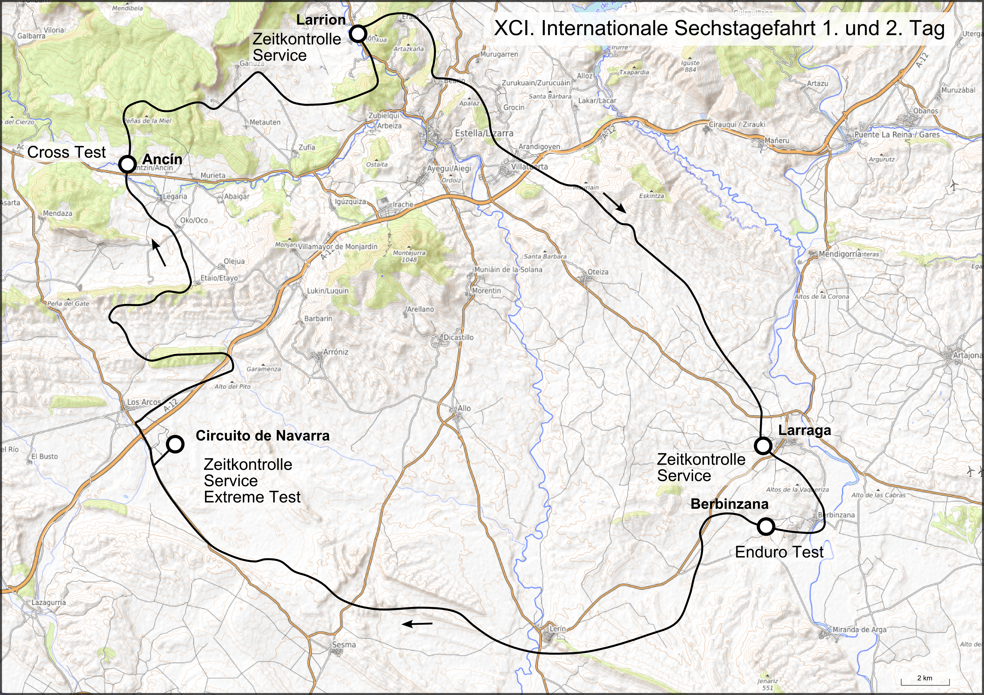 Karte der 91. Internationale Sechstagefahrt, Route der Tage 1 und 2